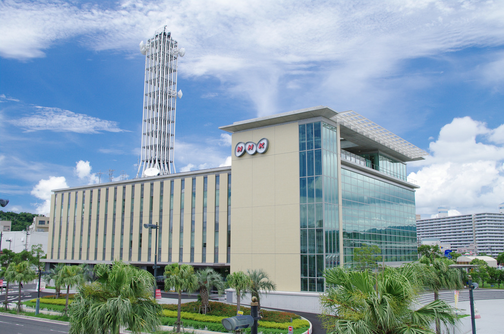 NHK Kagoshima Broadcasting Hall